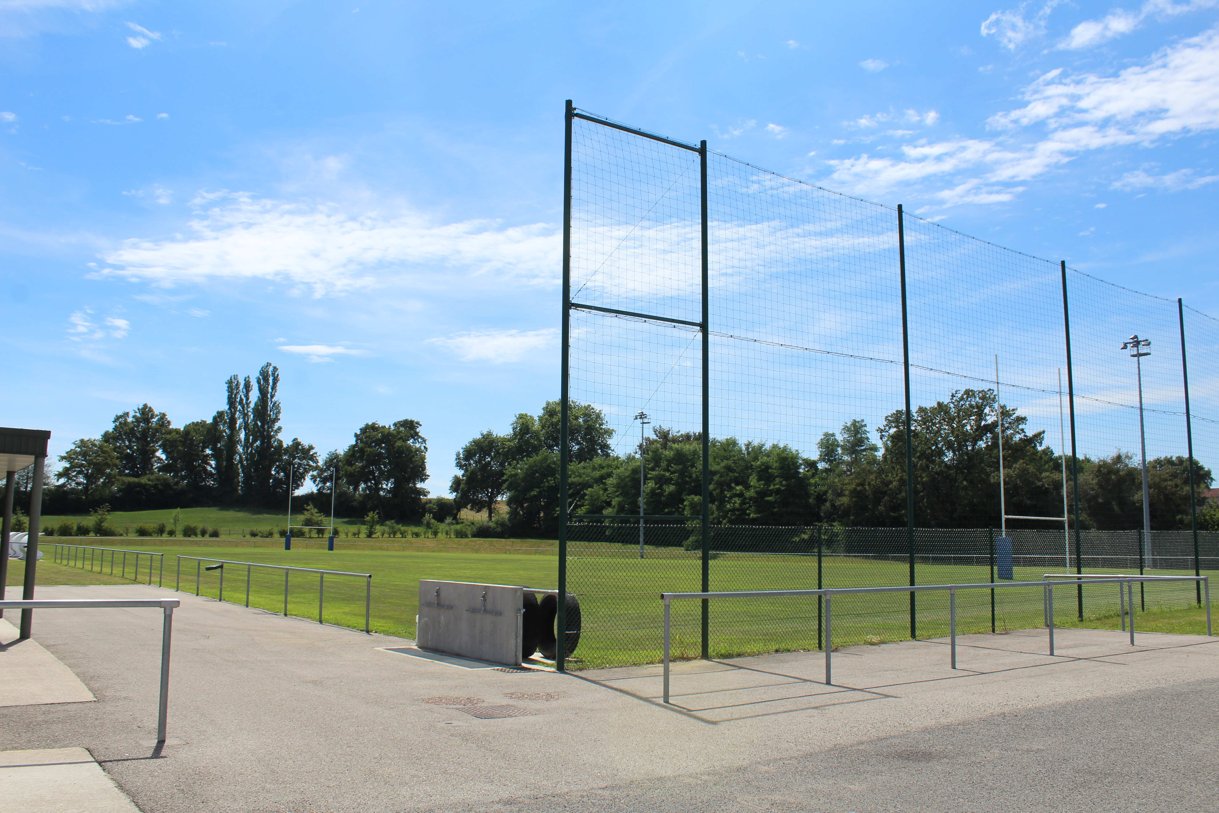 Terrain de rugby du stade de la Veyle à Laiz.